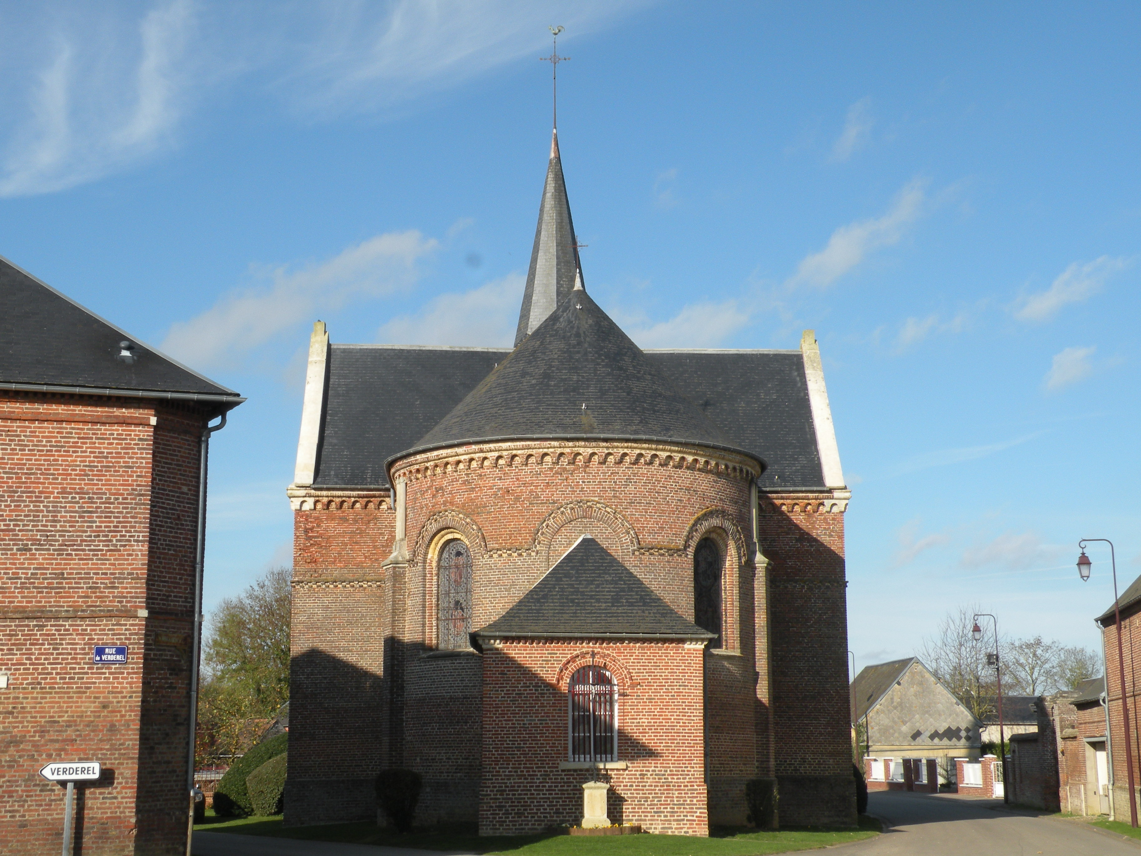 église Saint-Prix de Maisoncelle-Saint-Pierre